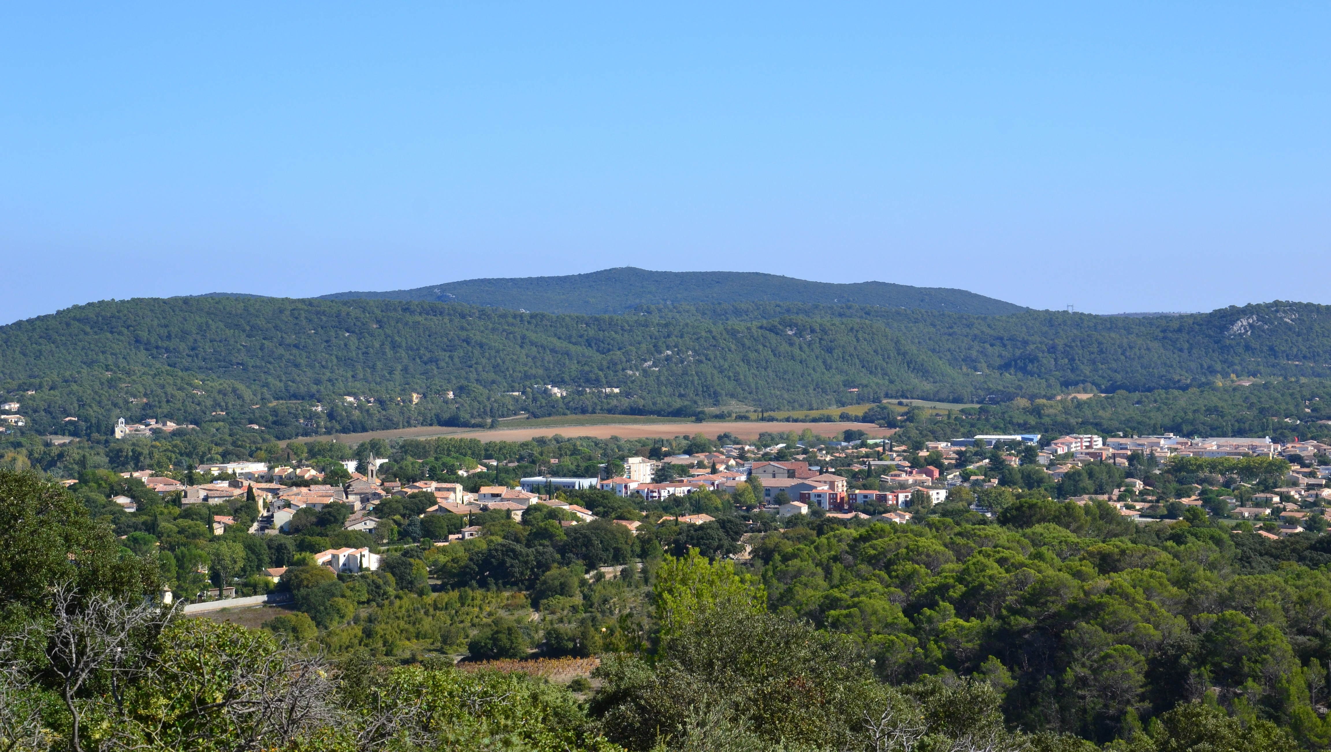 Saint-Mathieu-de-Tréviers, Hérault.